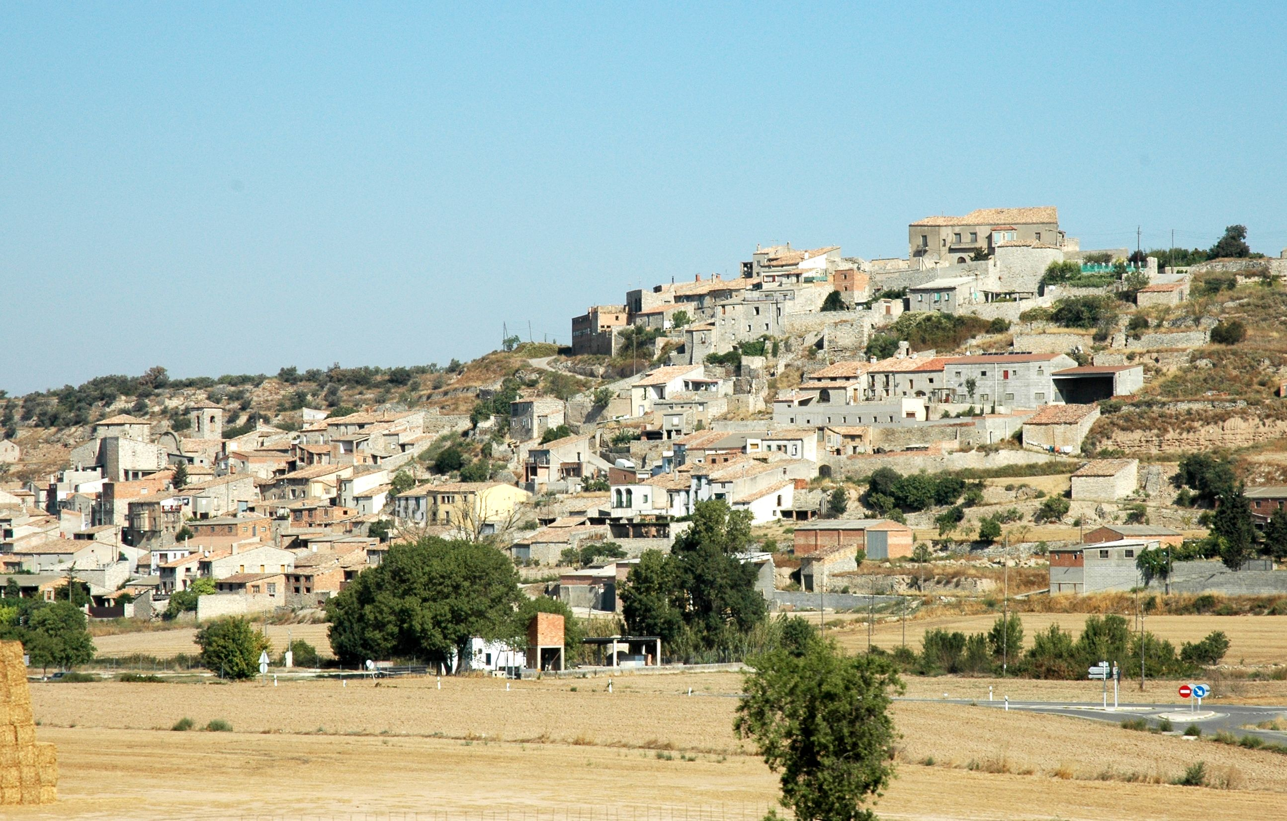 Les Oluges